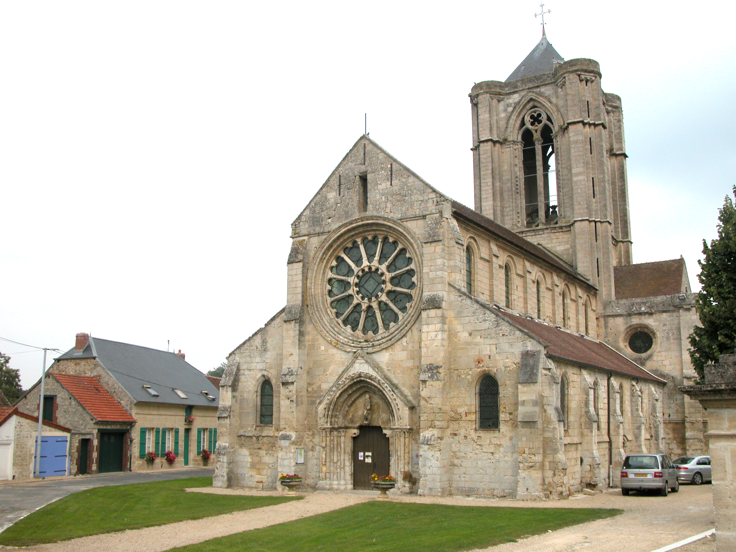 Église de Vorges - Photo personnelle (2006)